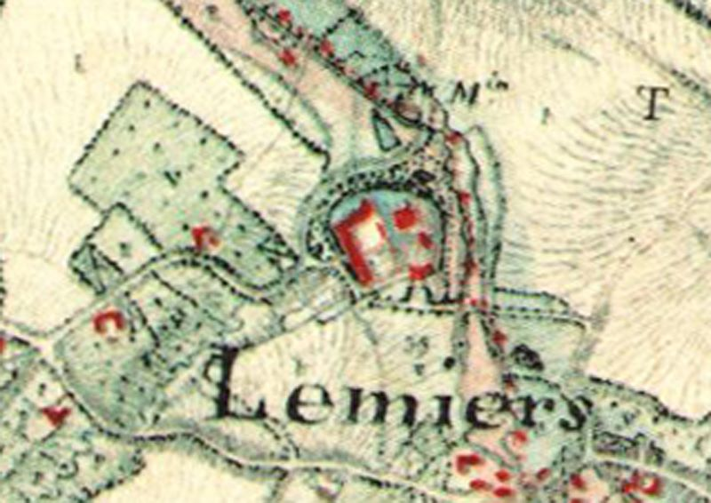 Schloss Lemiers auf der sogenannten Tranchotkarte